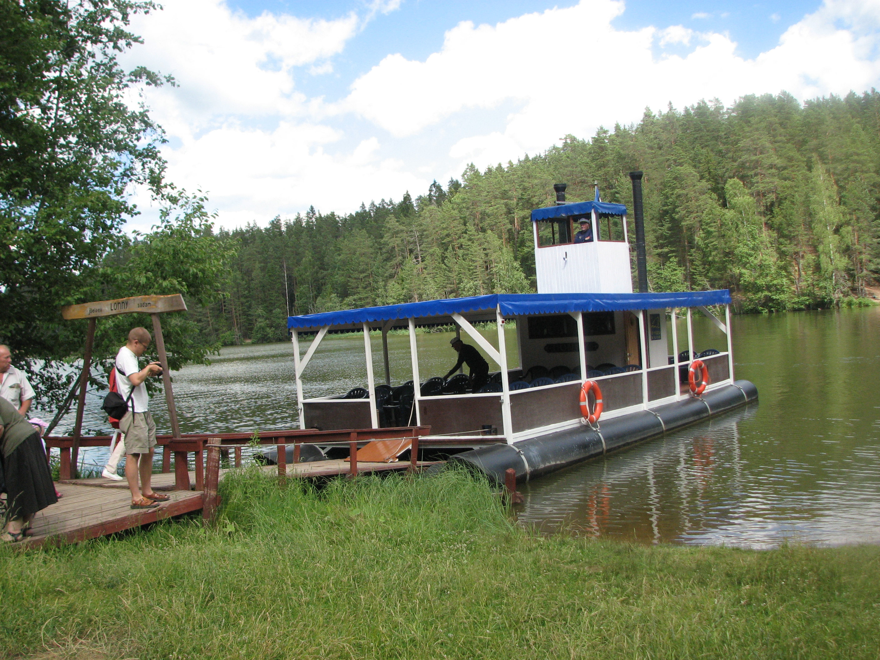 Jõelaev Lonny Saesaarel.